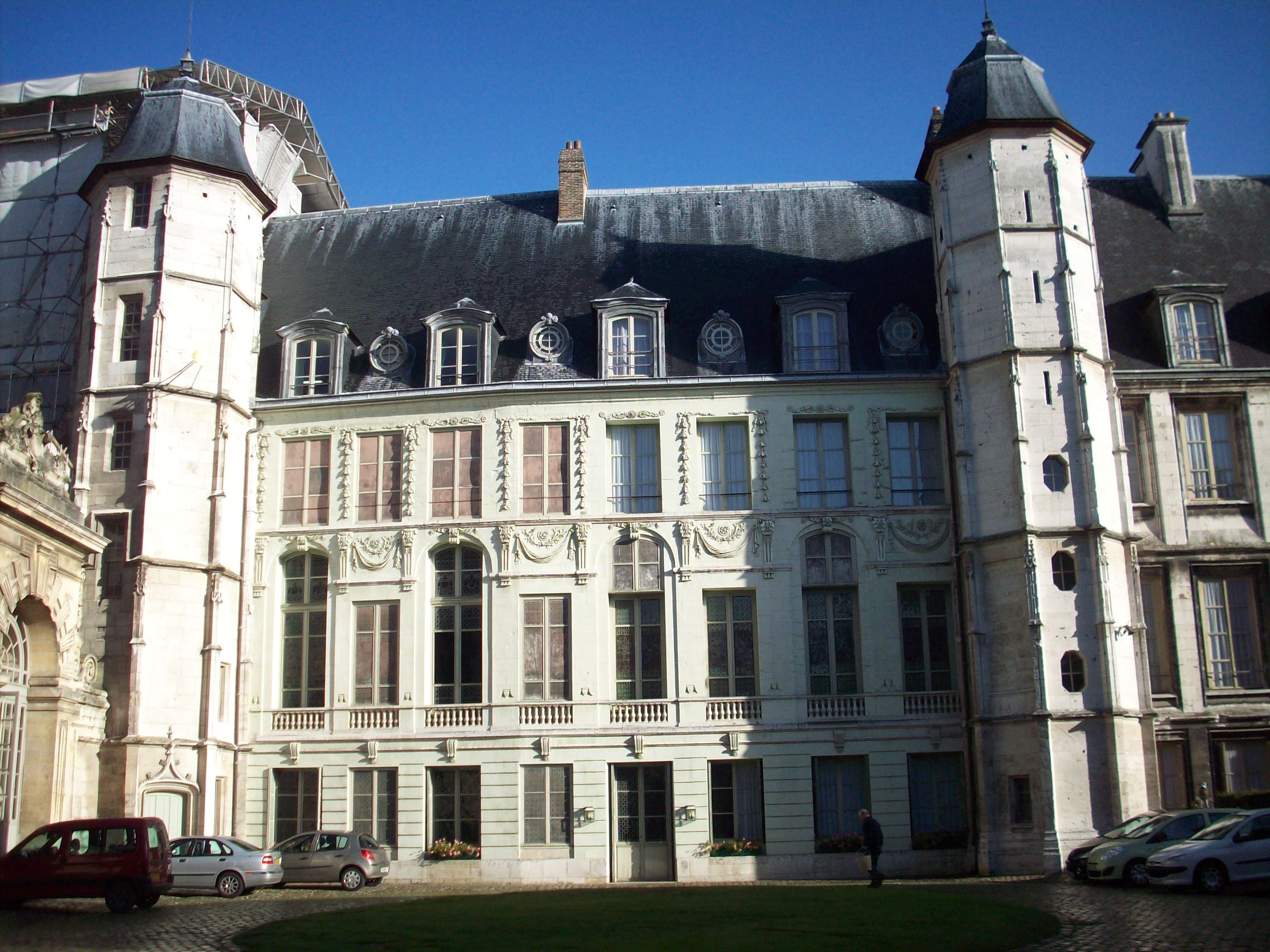 Archevêché de Rouen, avec ses baies en trompe-l'oeil.